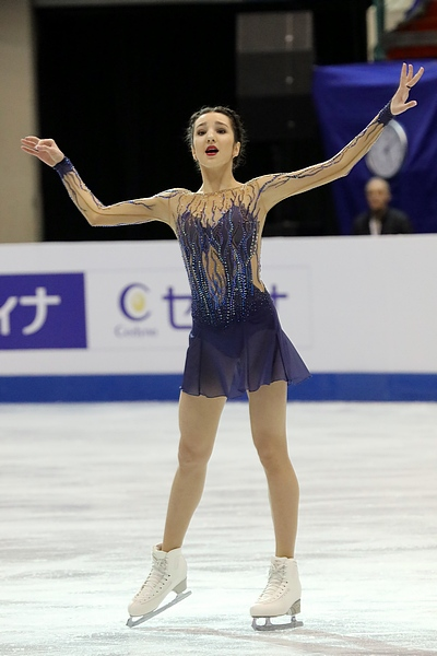 Полина Цурская (Россия) на чемпионате мира среди юниоров 2017